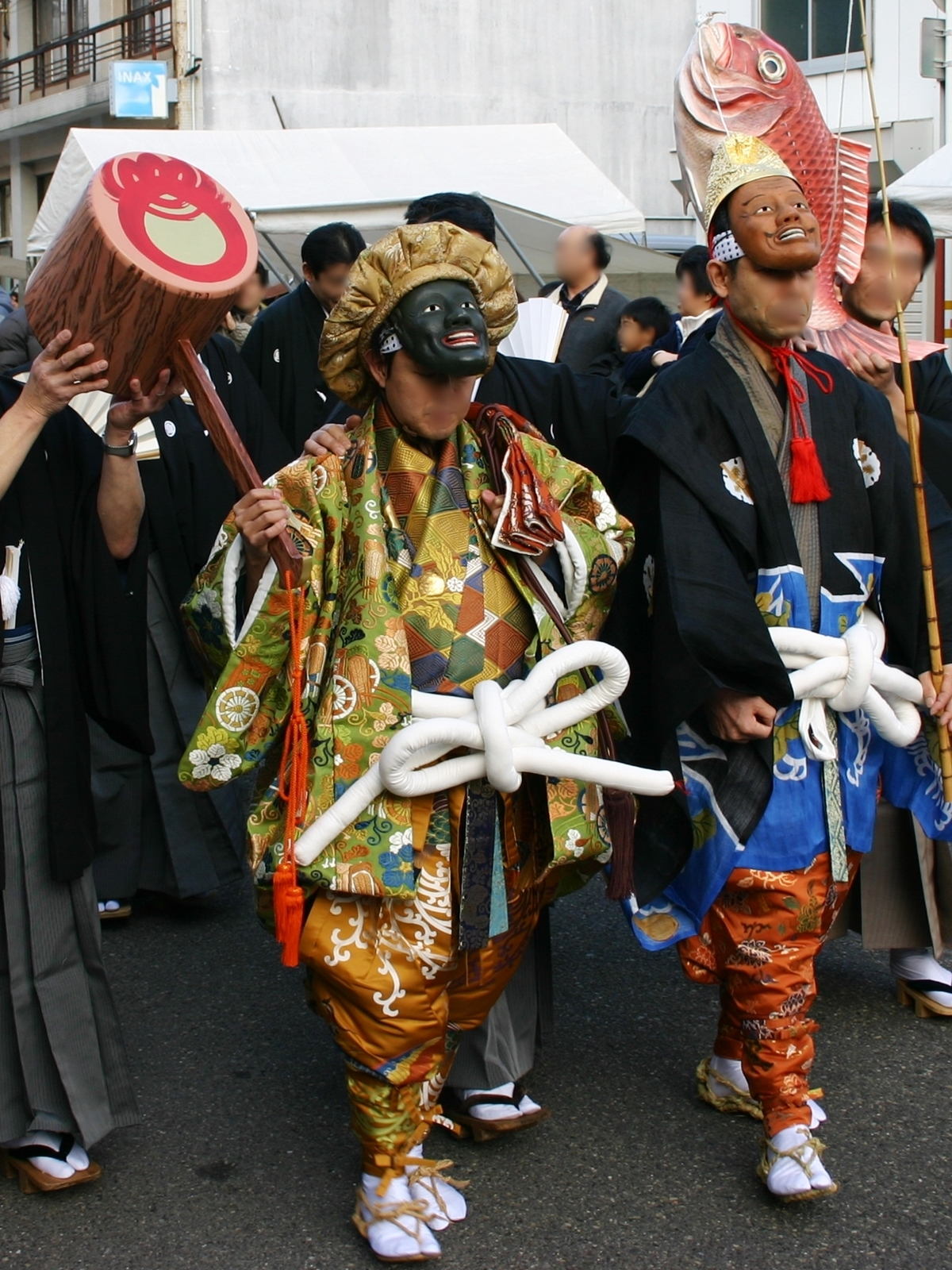 福井県敦賀市相生町西町通りで毎年1月におこなわれる夷子大黒綱引き、国の重要無形民俗文化財に指定されている。